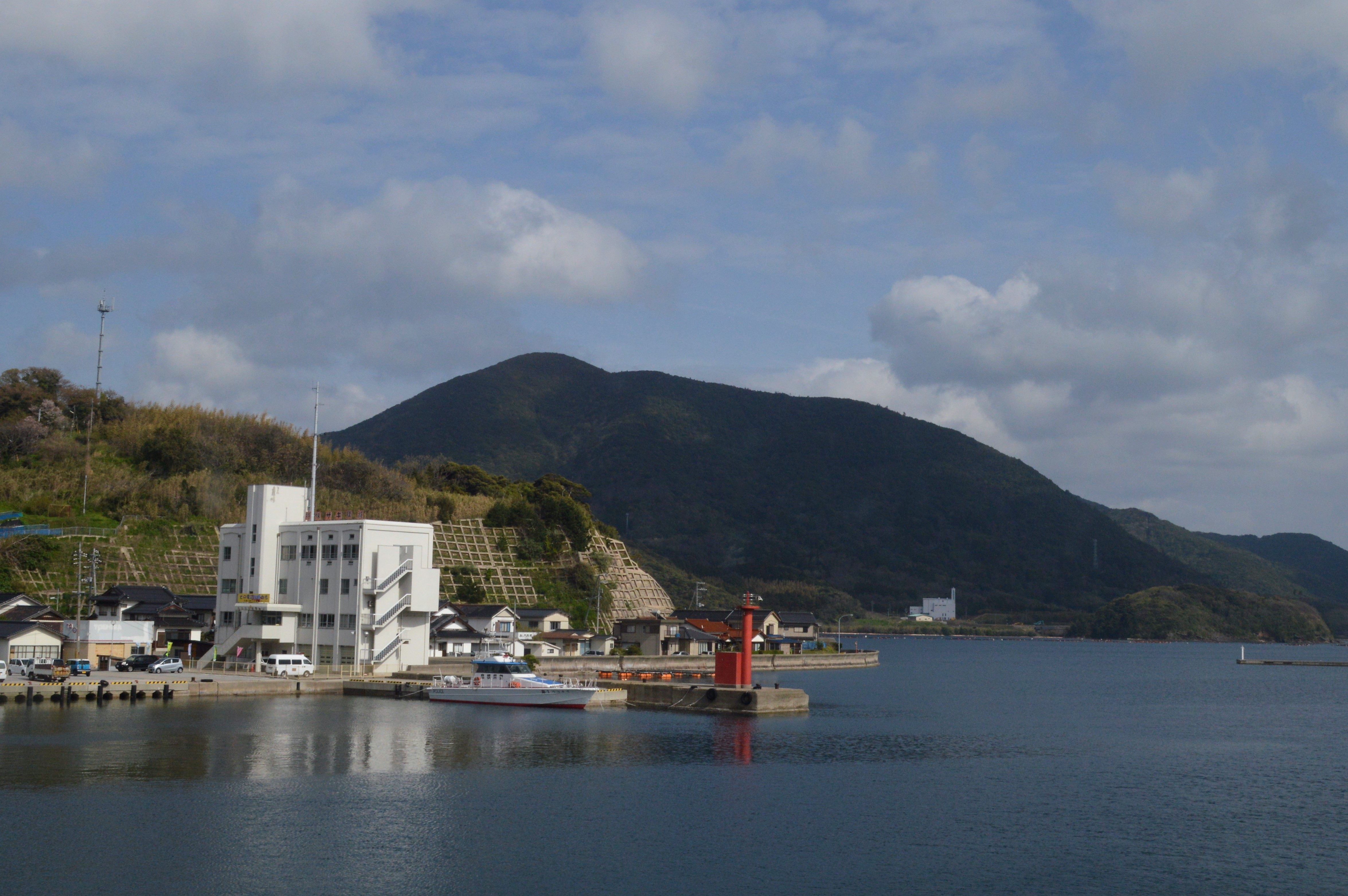 島根県隠岐郡西ノ島町（西ノ島）にある焼火山（たくひやま）。